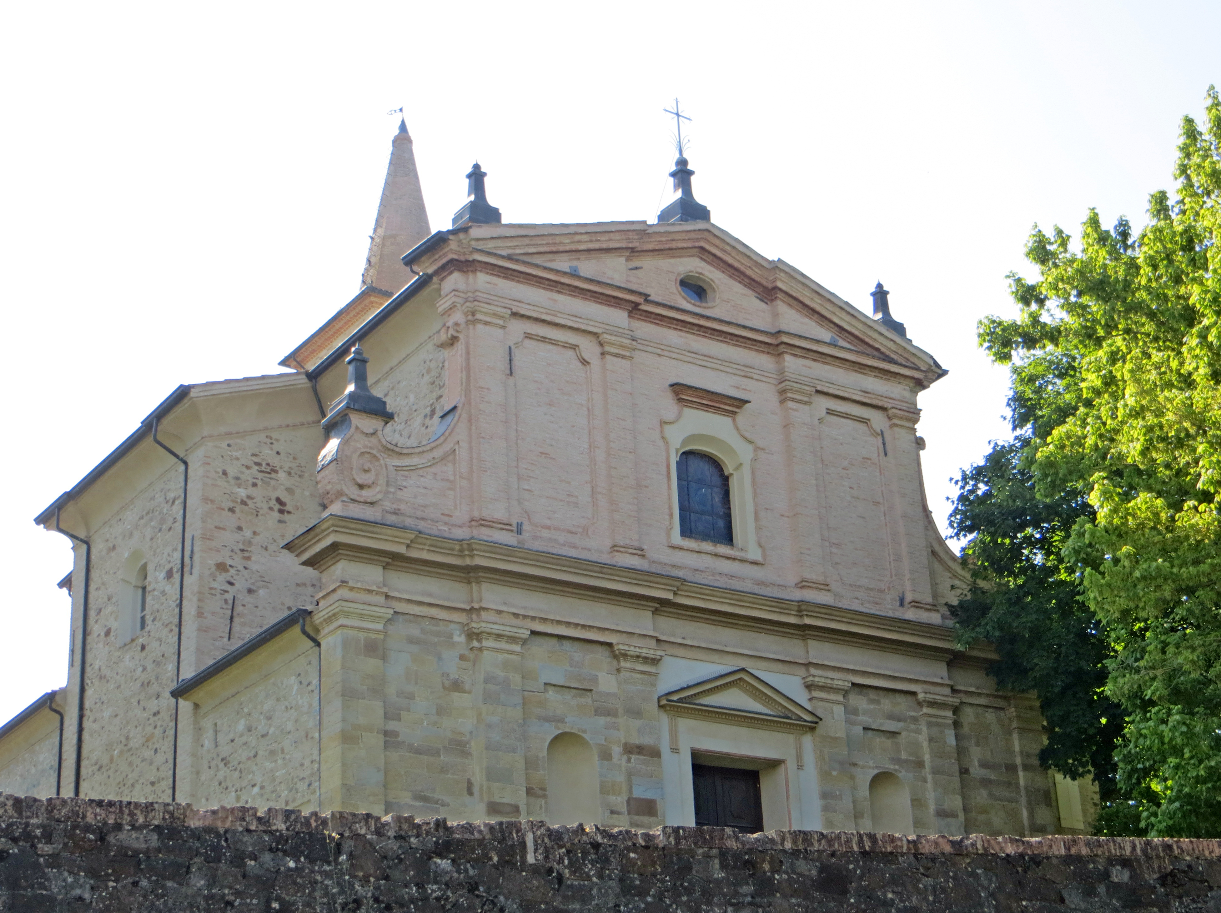 Chiesa di San Michele Arcangelo (Mattaleto, Langhirano) - facciata